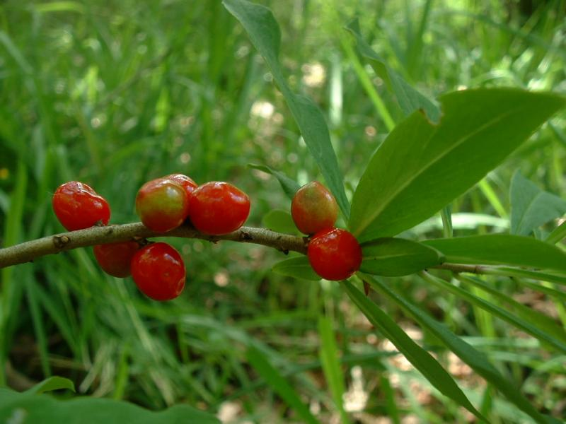 Bois joli (fruits), photo J.F. Gaffard, Bucey-lès-Gy, juin2004